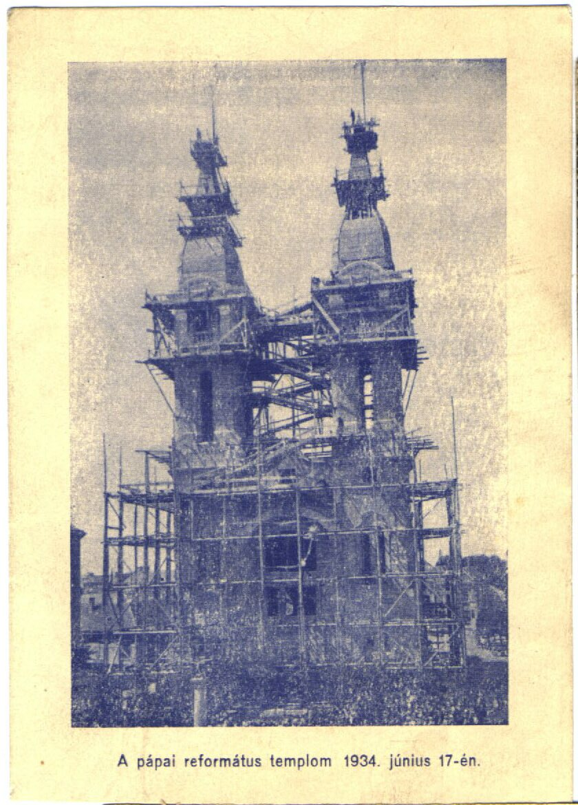 The Calvinist Church in Pápa, Hungary being built in 1934 on a comtemporary postcard. A pápai református templom építése 1934-ben, egy korabeli képeslapon.